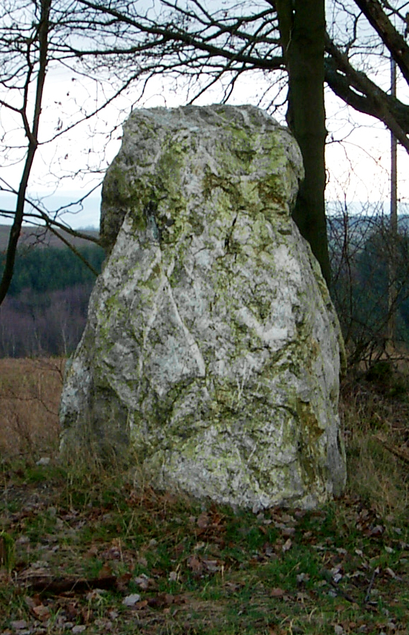 Schönberg, Landkreis Bernkastel-Wittlich, Menhir an der Trafostation (und an der Zufahrtststraße zum Ort)